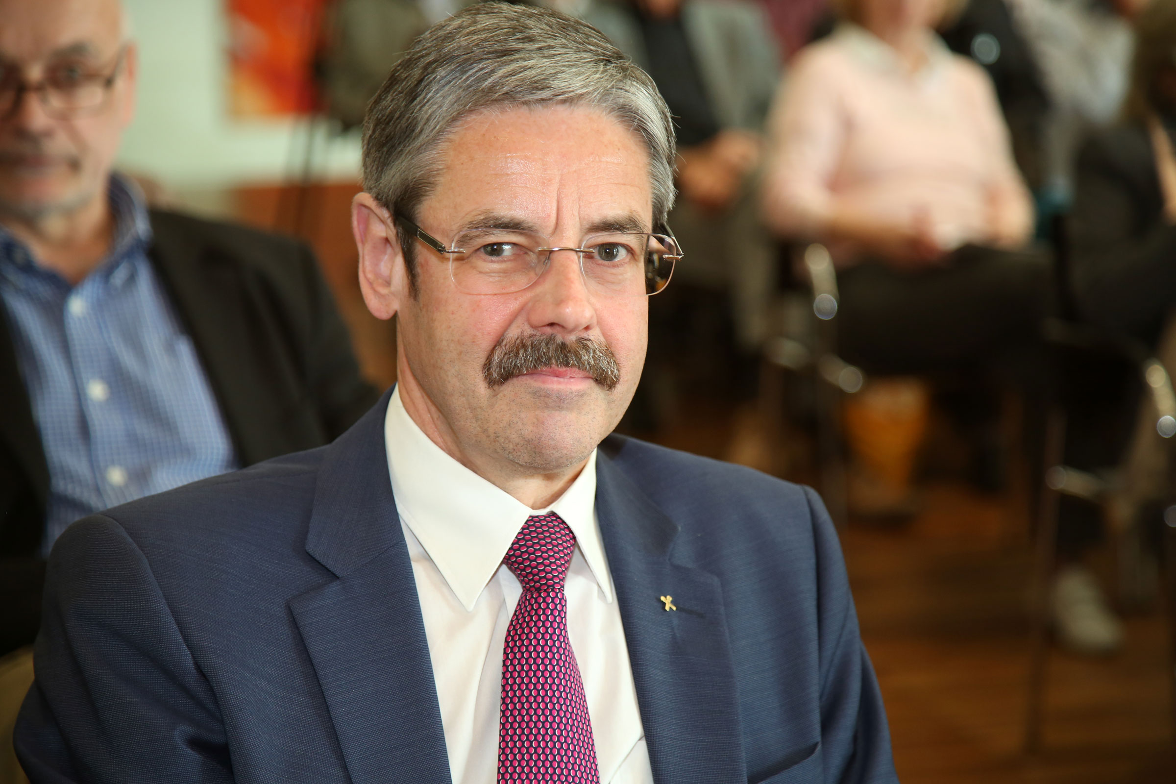 Hameseder_Erwin-9631